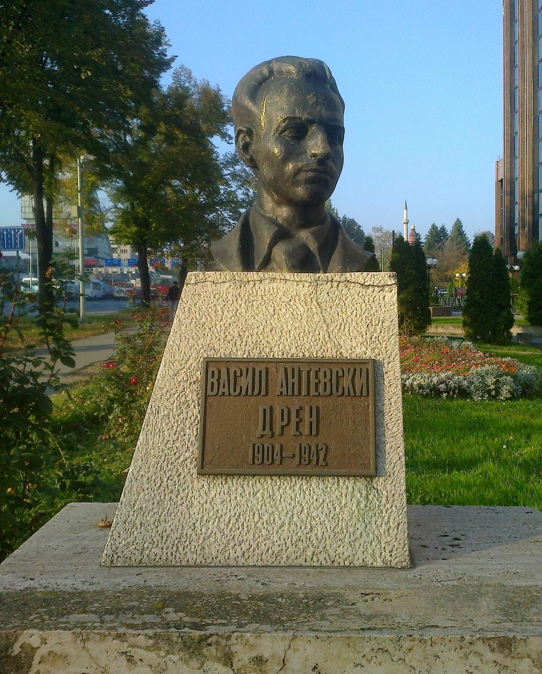 Биста на Васил Антевски - Дрен пред Апелациониот суд во Скопје